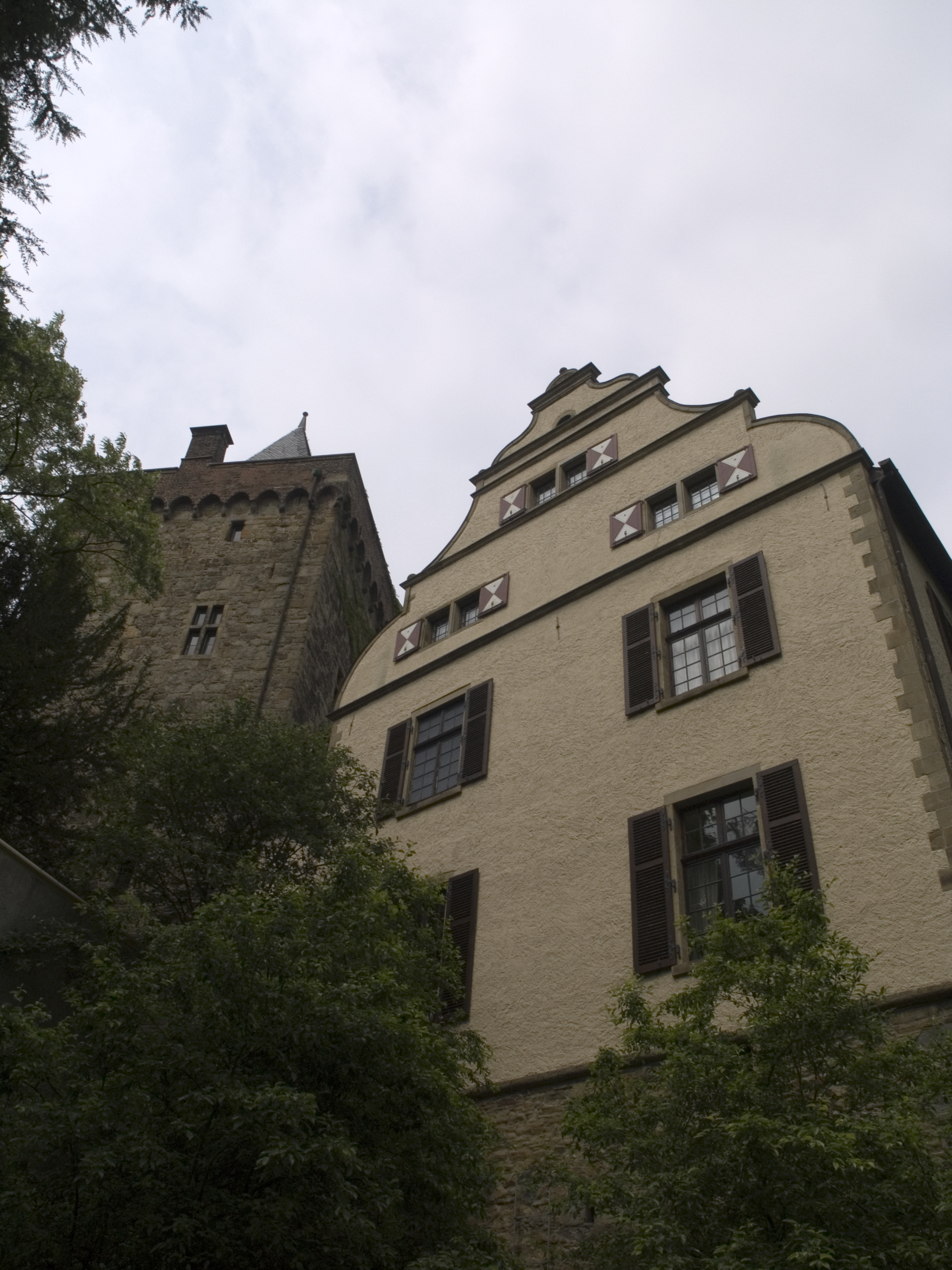 Северный Рейн-Вестфалия, Ратинген - Замок Ландсберг